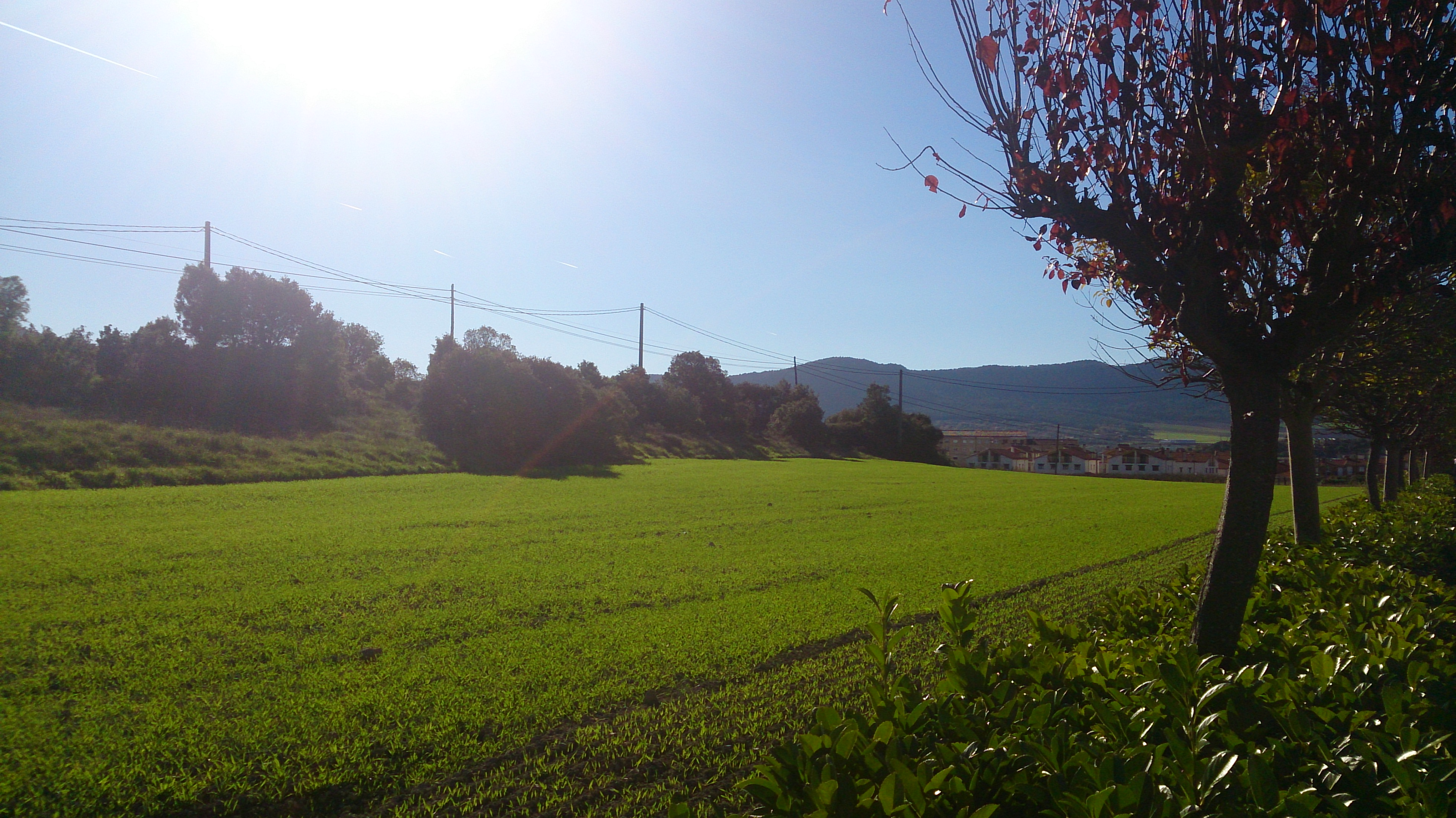 Nanclares de la Oca